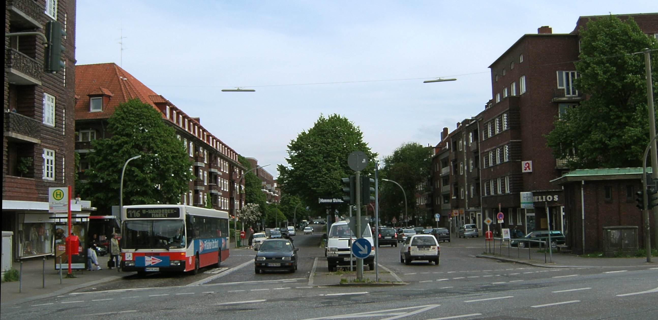 Blick vom Hammer Steindamm, Höhe S-Bahnhof Hasselbrook, in Hamm-Nord in die Caspar-Voght-Straße, vor dem Umbau der Kreuzung